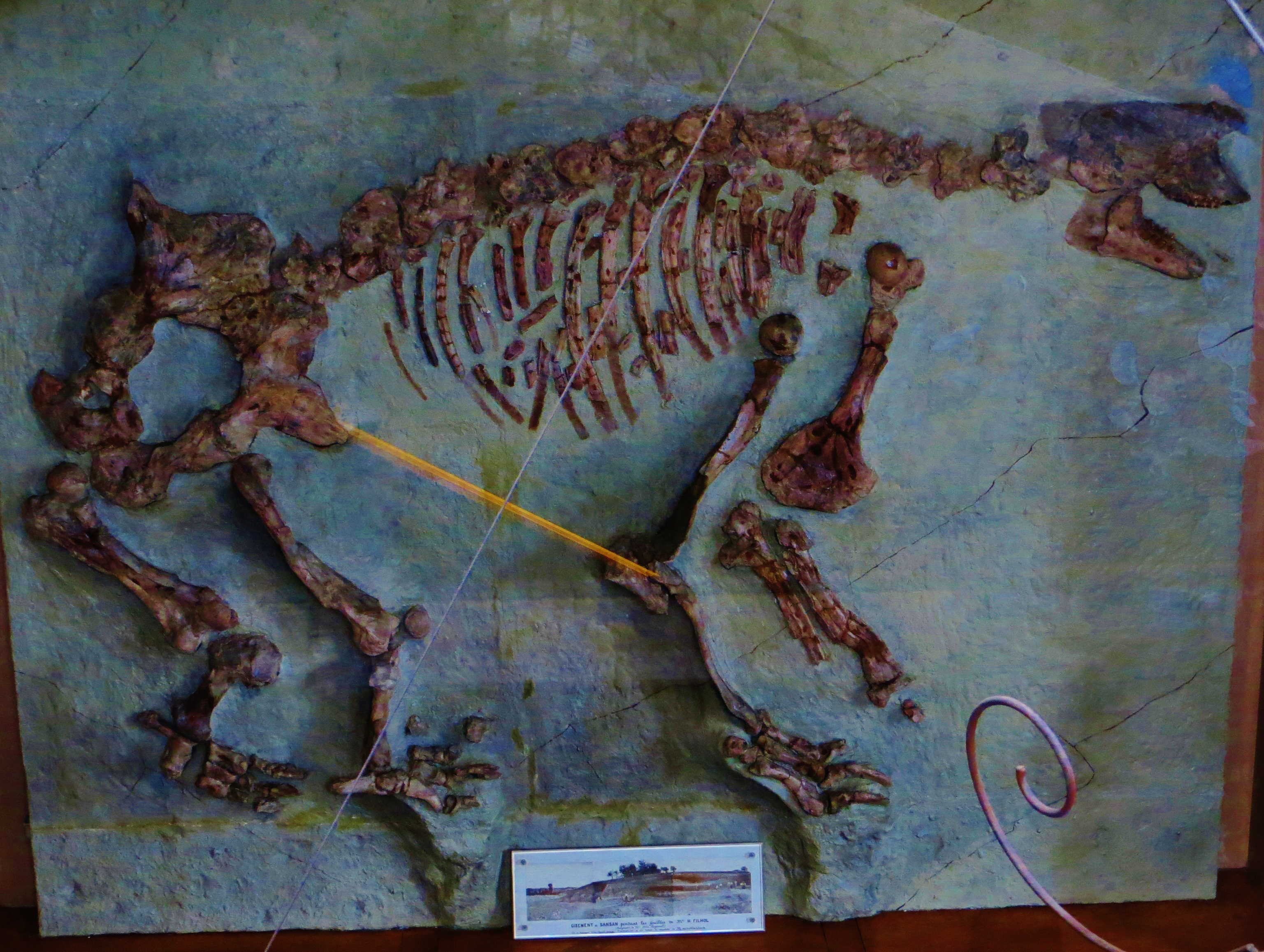 Fossil of Anisodon, an extinct mammal- Took the photo at Musee d'Histoire Naturelle, Paris